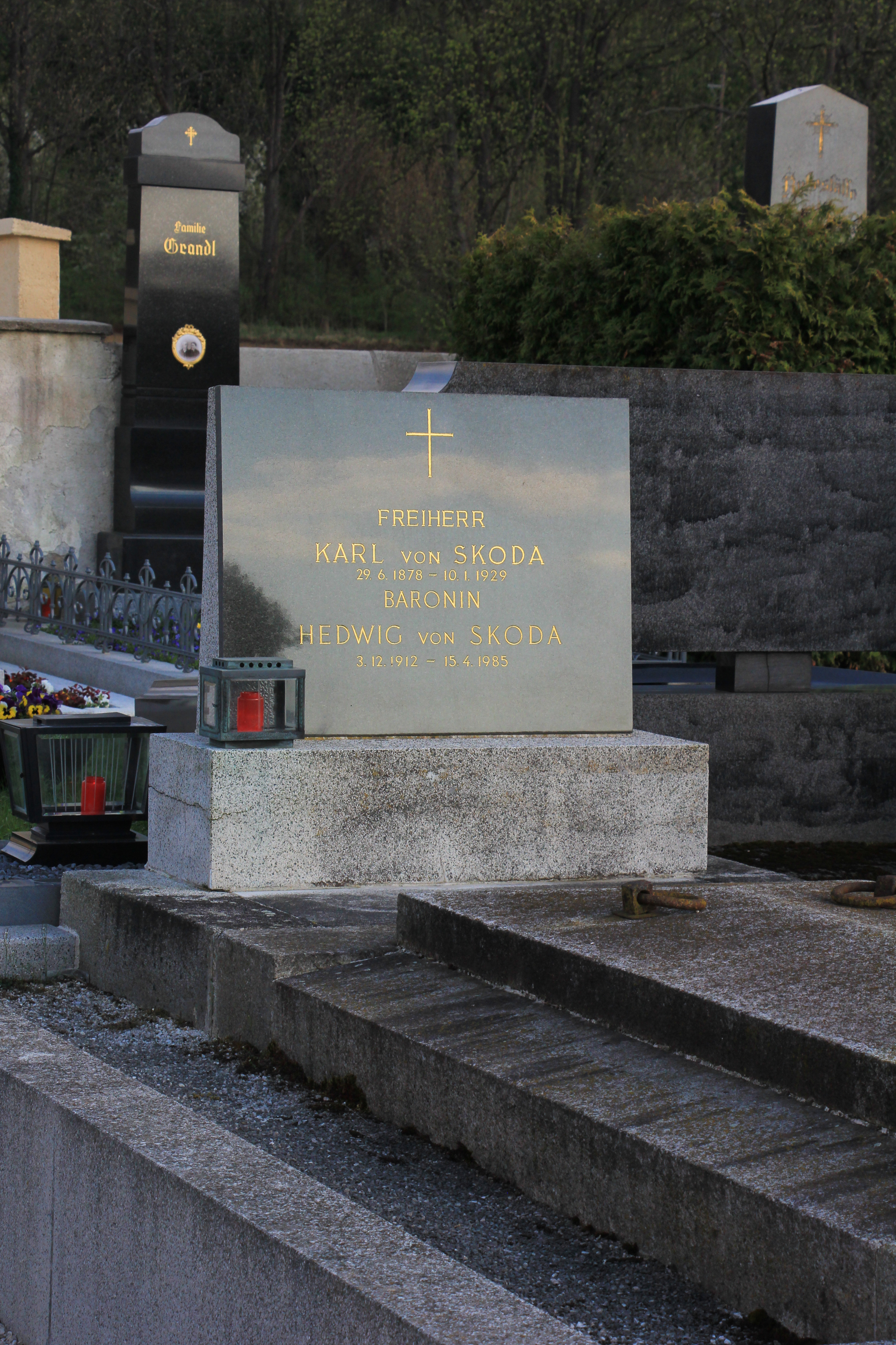 Grab Karl von Skoda in Gaaden